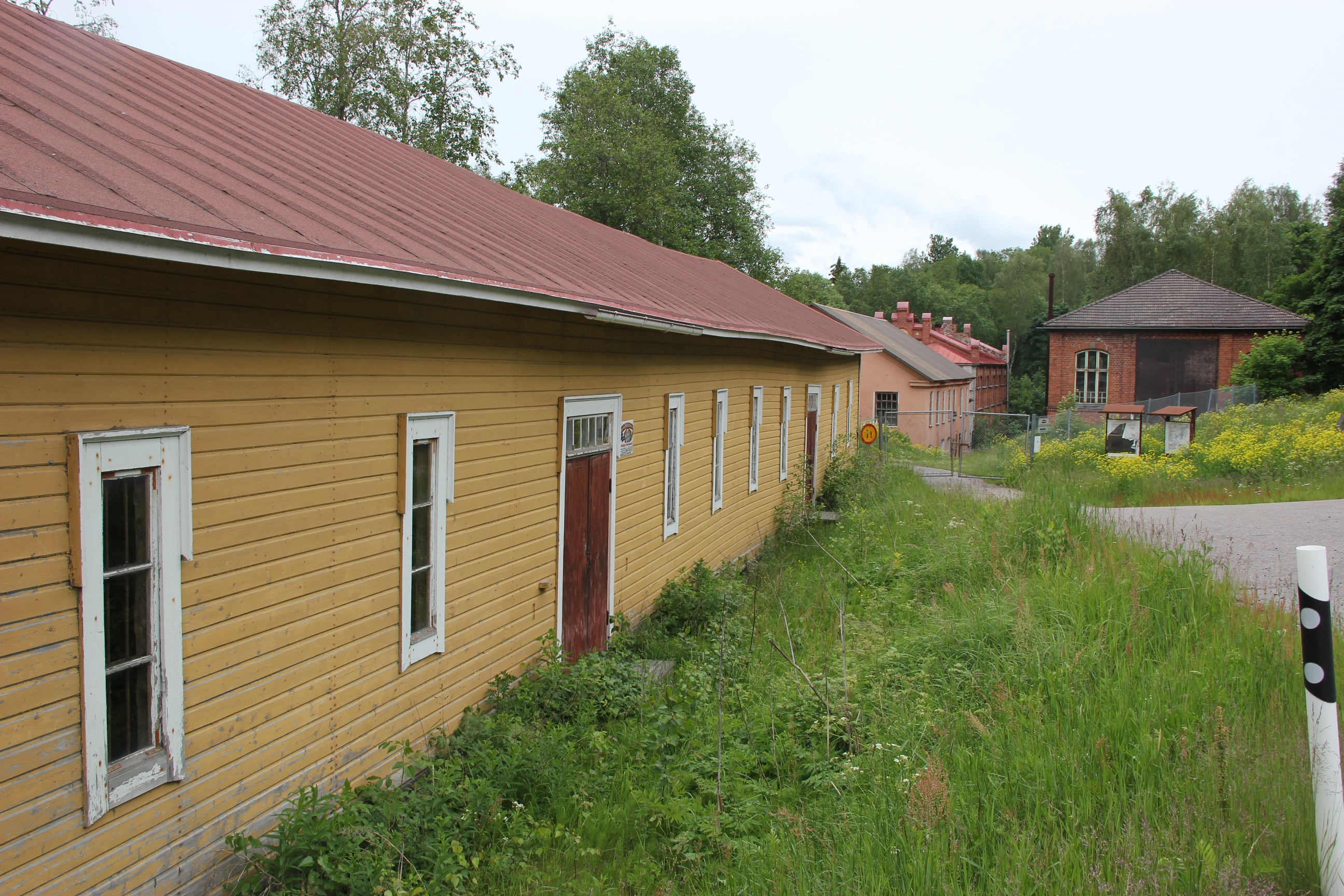 Antskogin ruukin rakennuksia